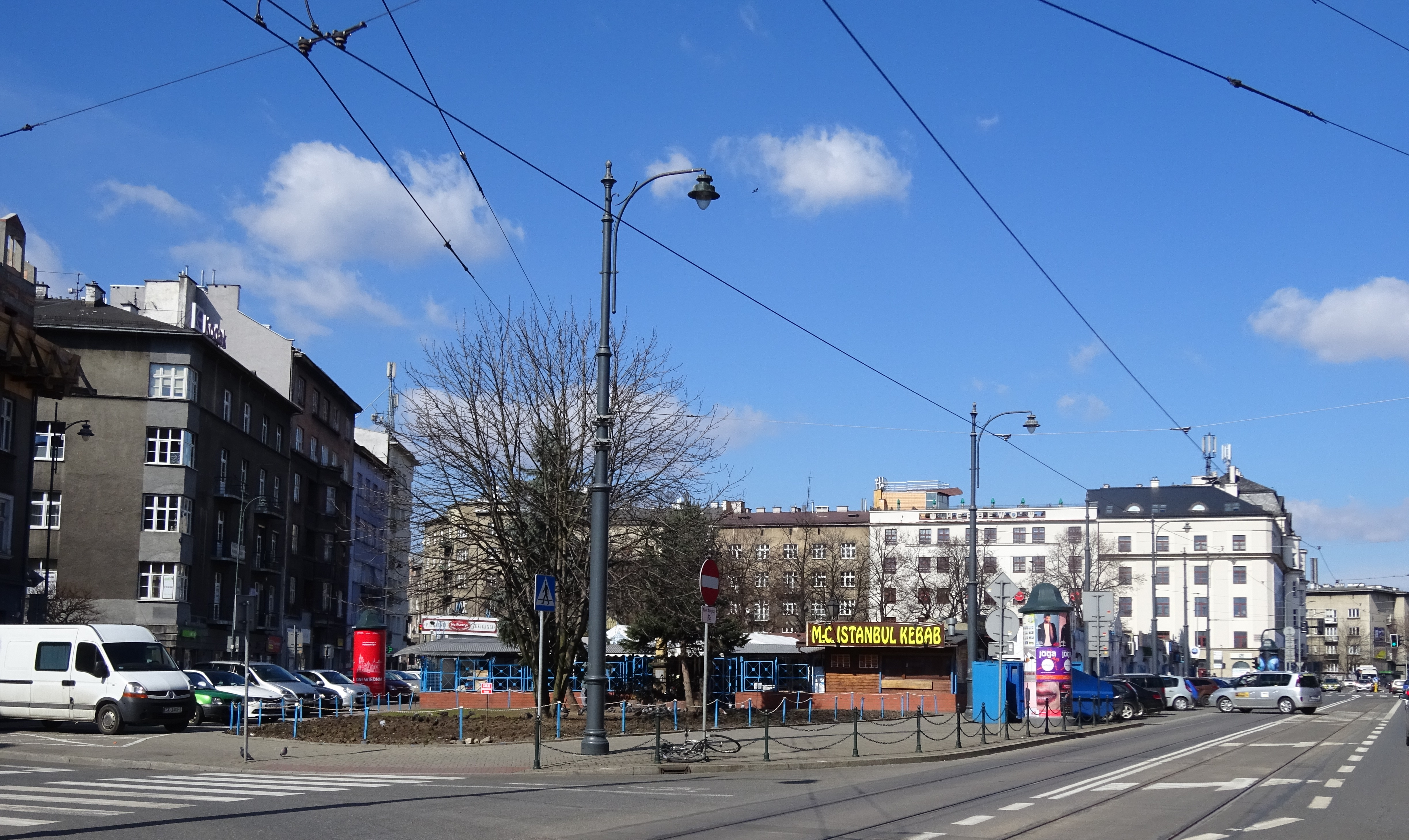 Plac Nowy Kleparz w Krakowie, widok z południa, z ul. Długiej. 2017